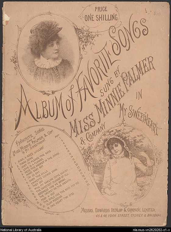 Album mit bekannten Songs von Minnie Palmer & Company